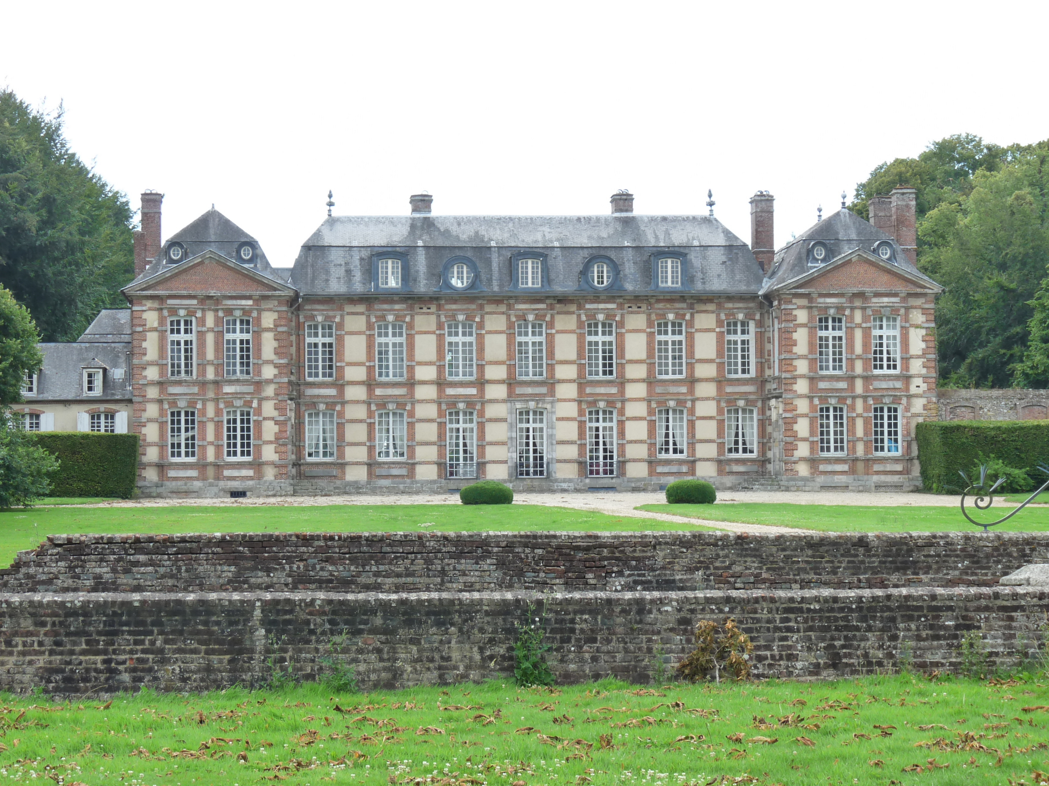 Château de Bretteville (InscritClassé) .